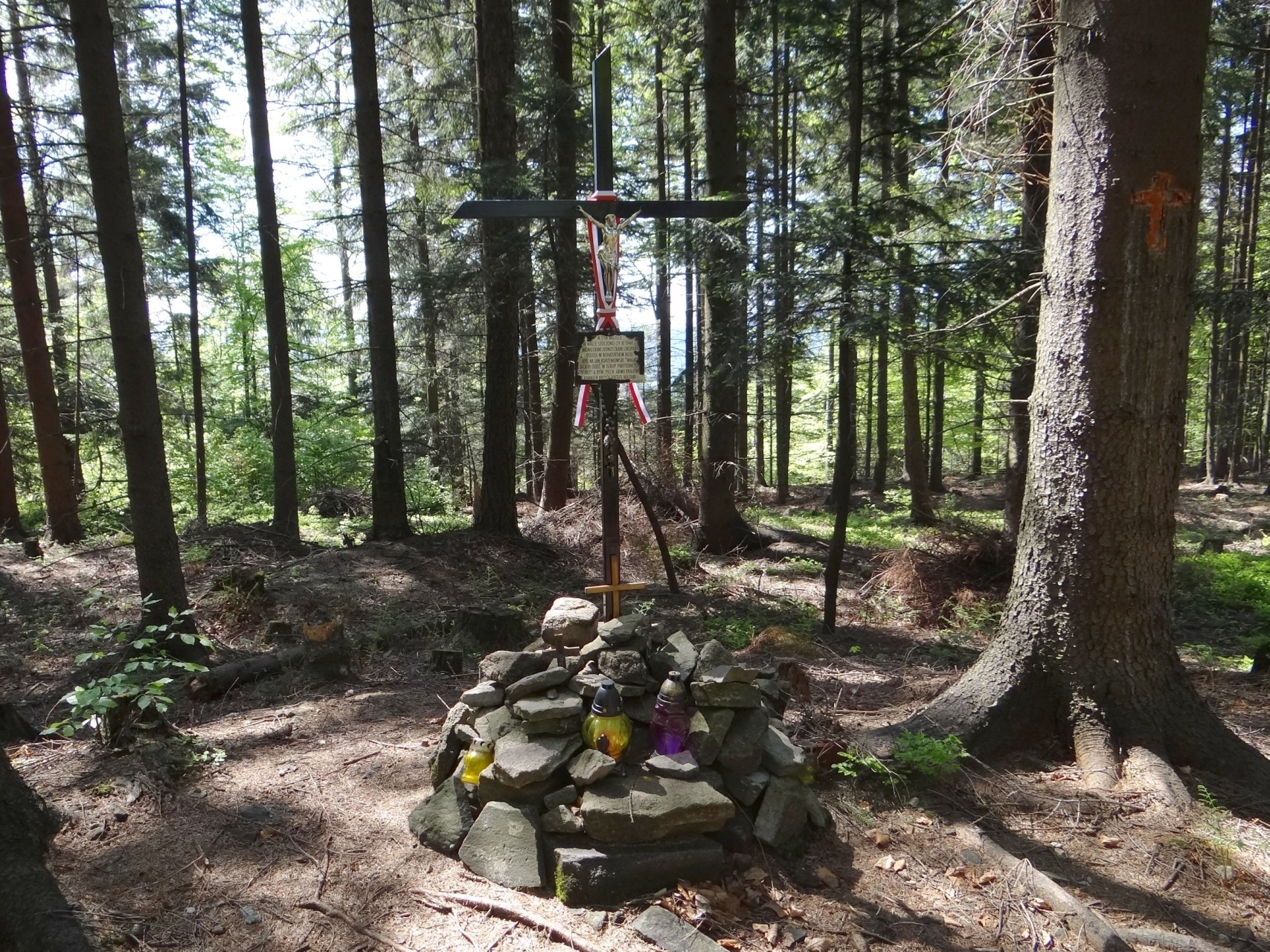 Mogiła partyzancka na grzbiecie Kotonia w Beskidzie Makowskim (między Groniem a Dłużycą)